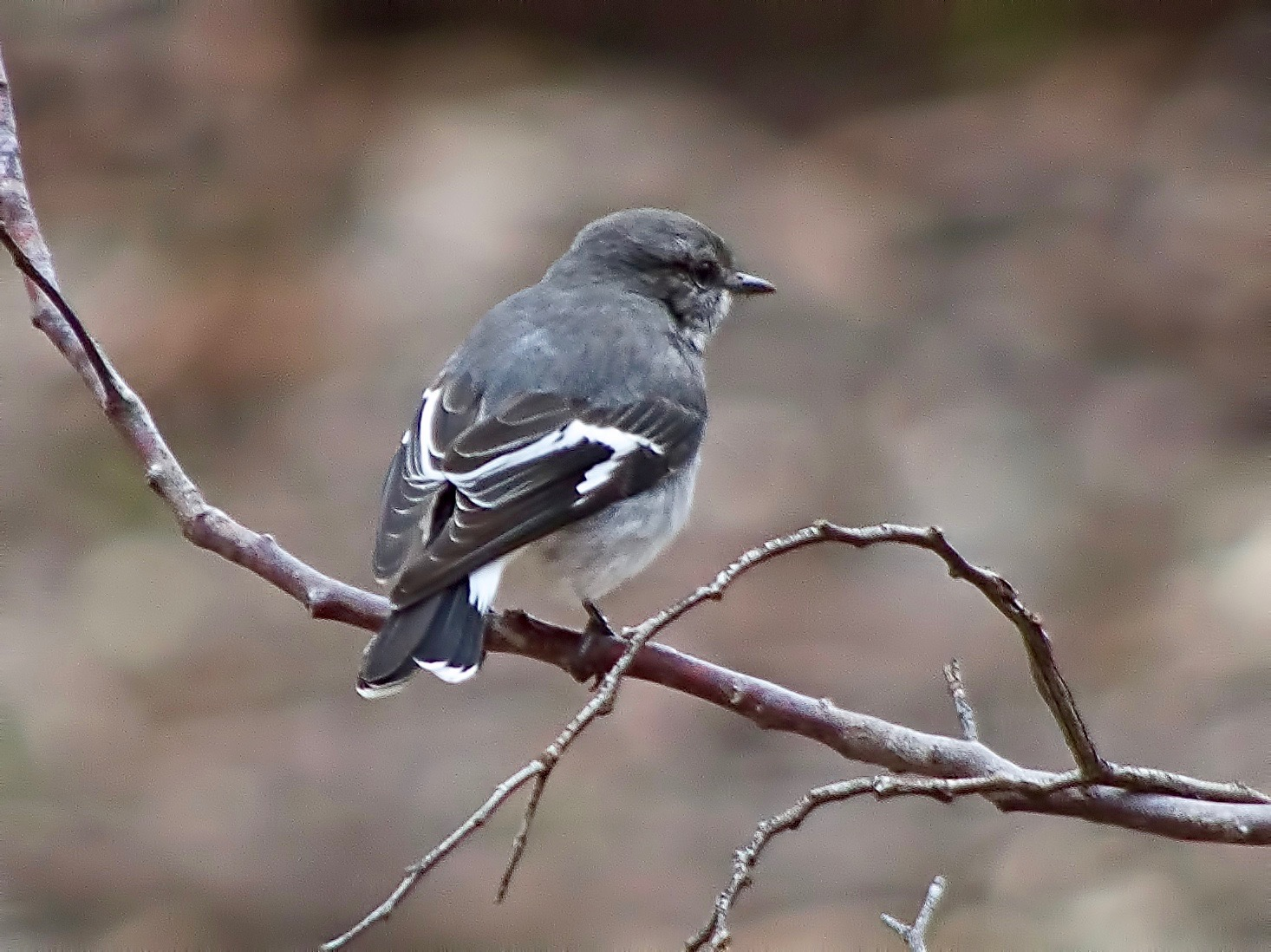 Female